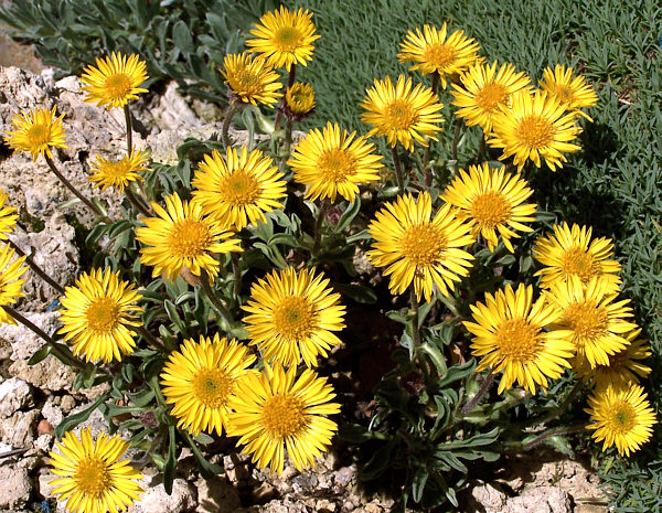 Plante vivace de 8 à 15 cm, des USA (état de Washington et Colombie Britannique), sur étendue pierreuse et éboulis acide. (photo en culture)